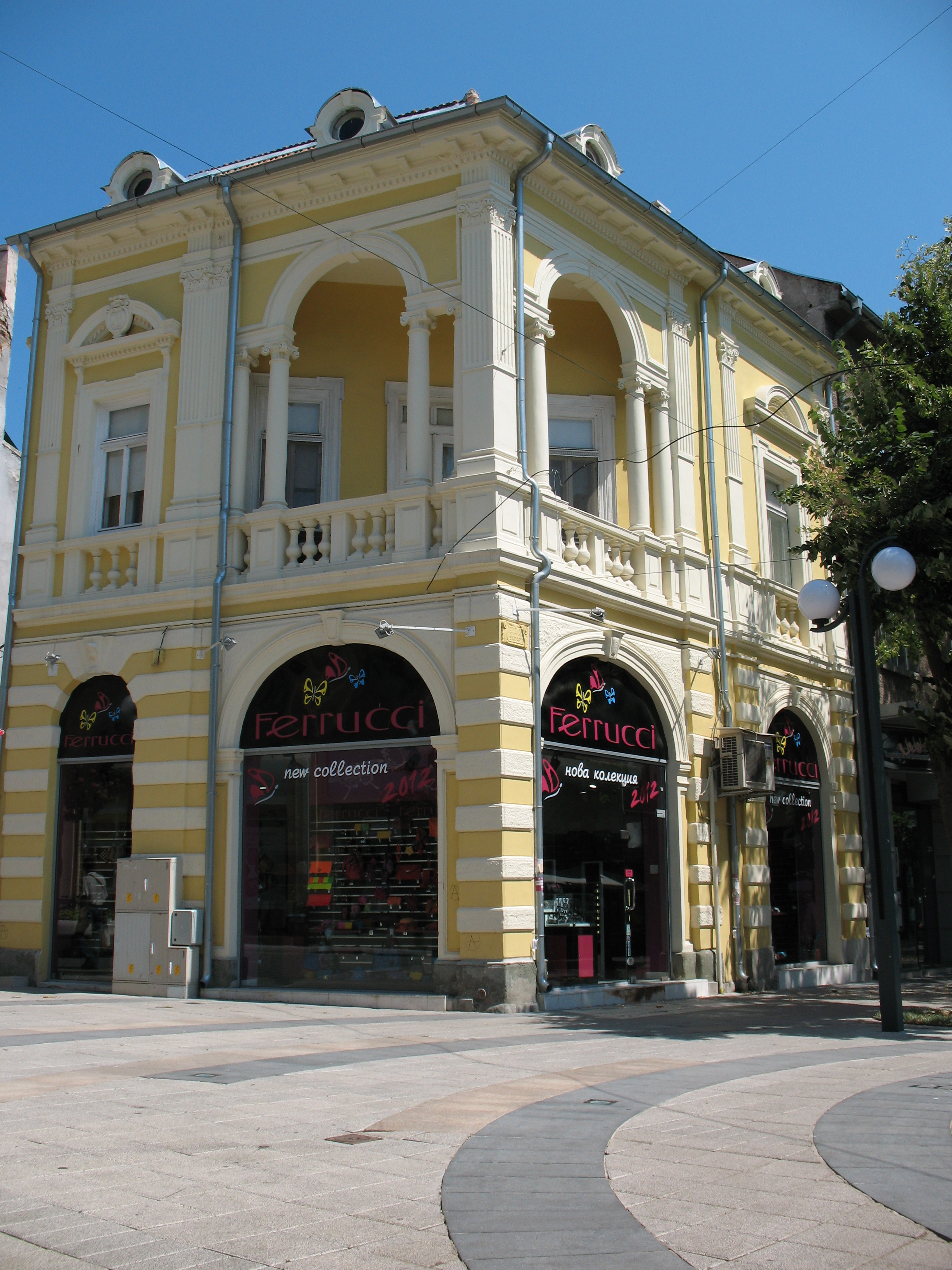 Къщата на Воденичаров на ул. „Александровска“ 71 в Бургас.